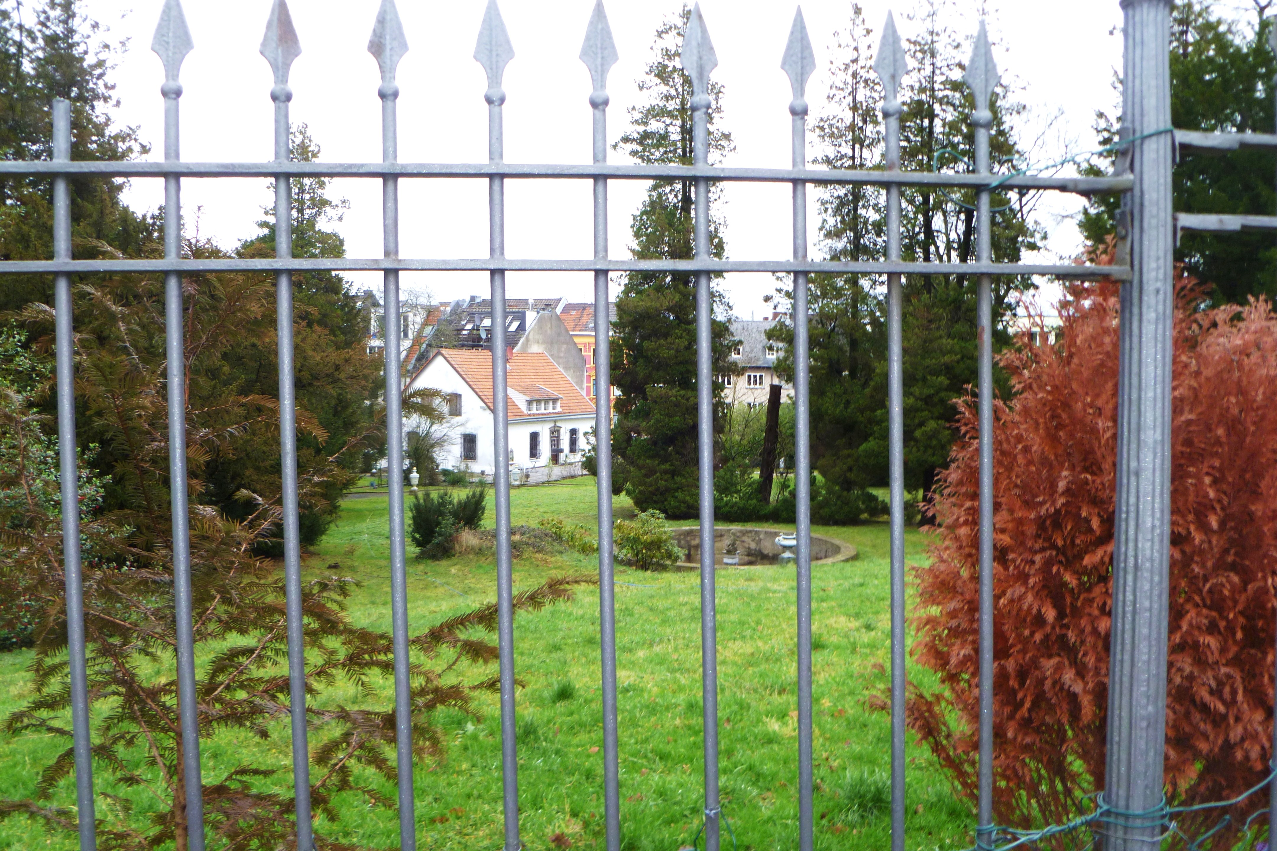 Park der ehemaligen Villa Flora in AAchen